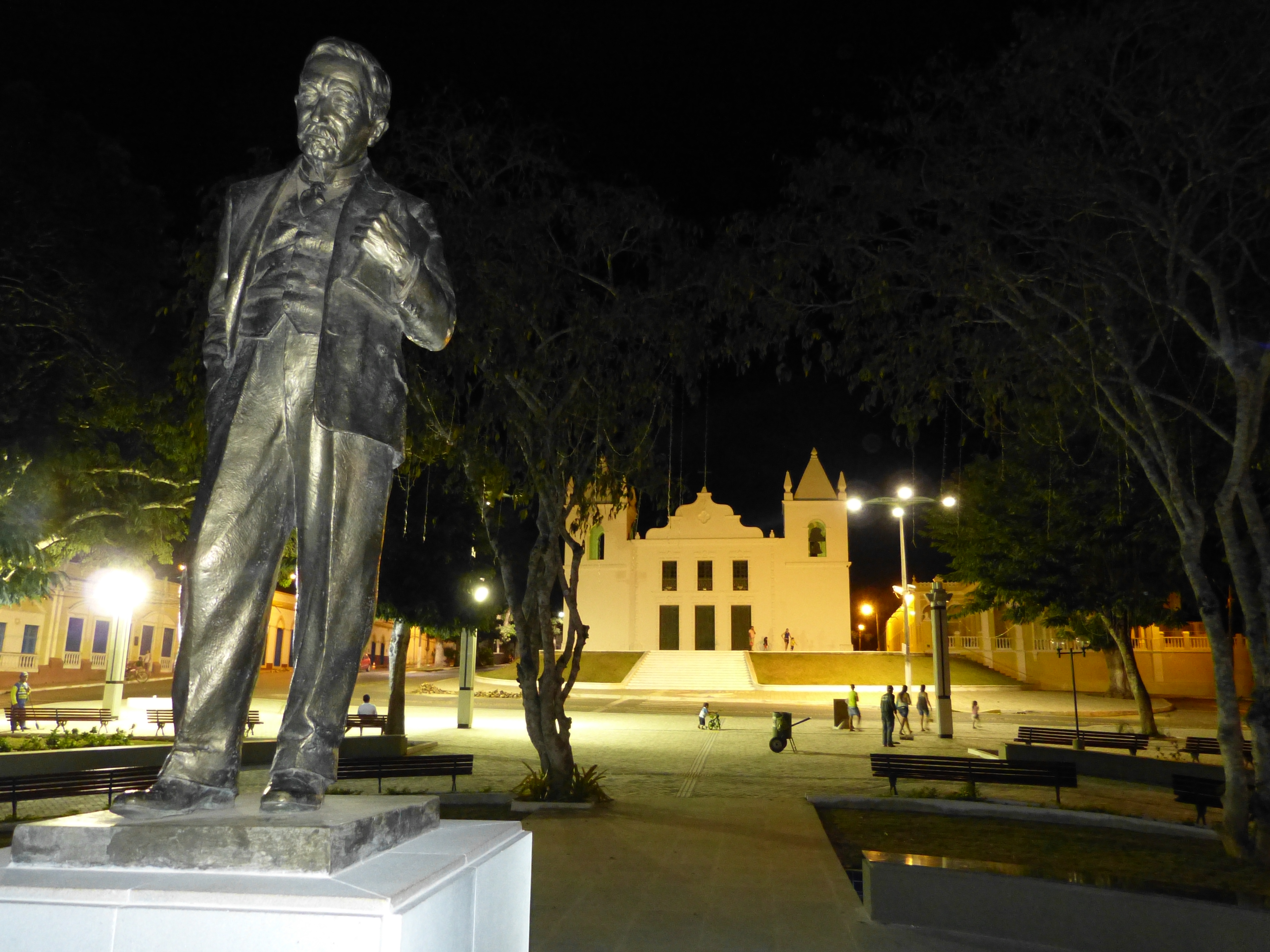 Estátua de Clovis Beviláqua - Viçosa do Ceará, Ceará, Brasil.